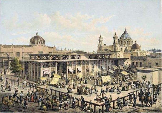 Antiguo Mercado Iturbide en la Ciudad de Mexico